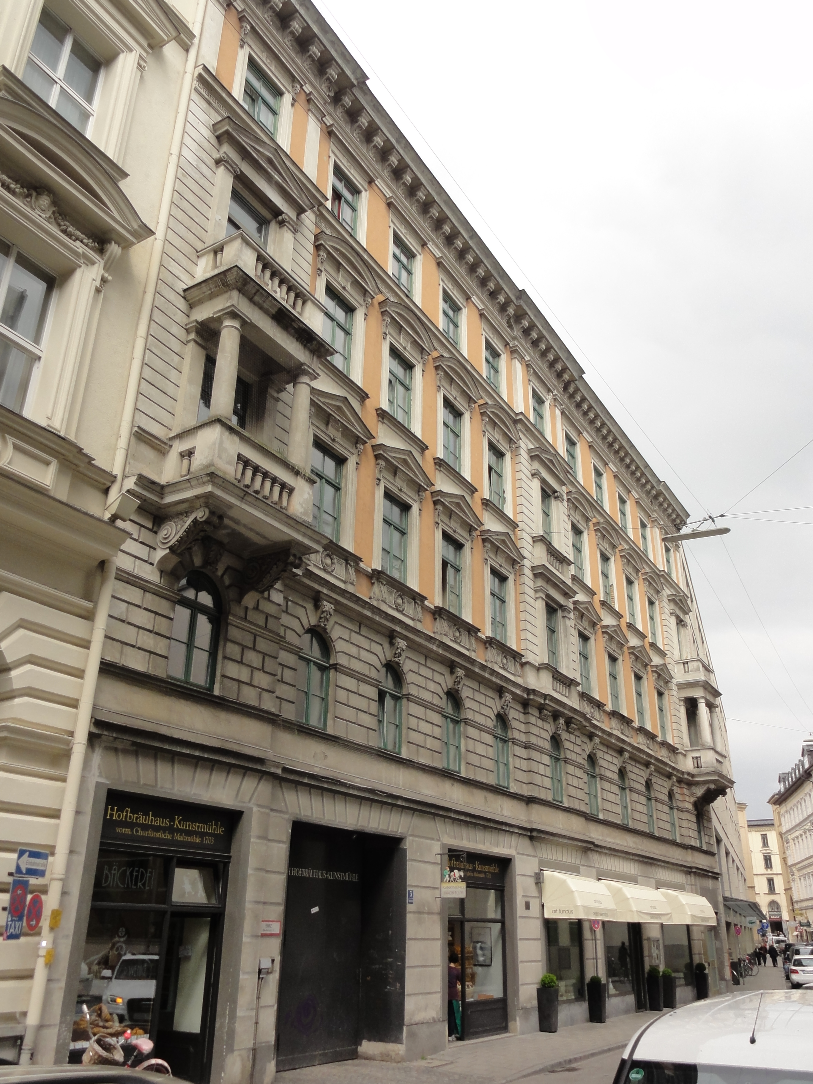 Munich, Neuturmstrasse 3 (Hofbräuhaus-Kunstmühle), Aussenansicht Frontfassade